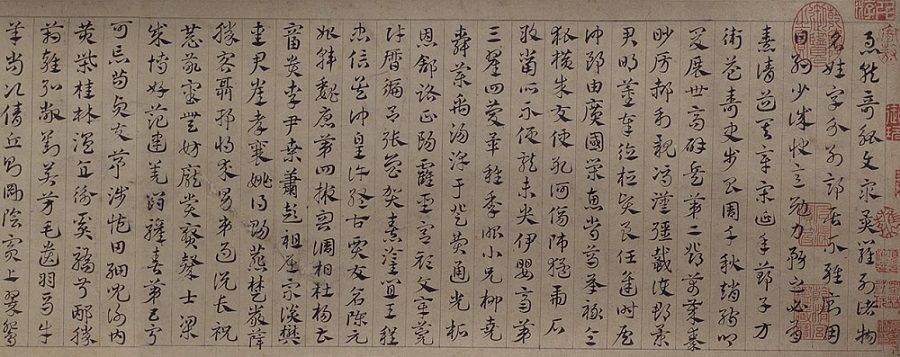 本帖为邓文原早年书，在元大都（今北京）西长安街，即双塔寺，今废。年款“大德三年三月十日”（1299年），邓文原当年42岁。